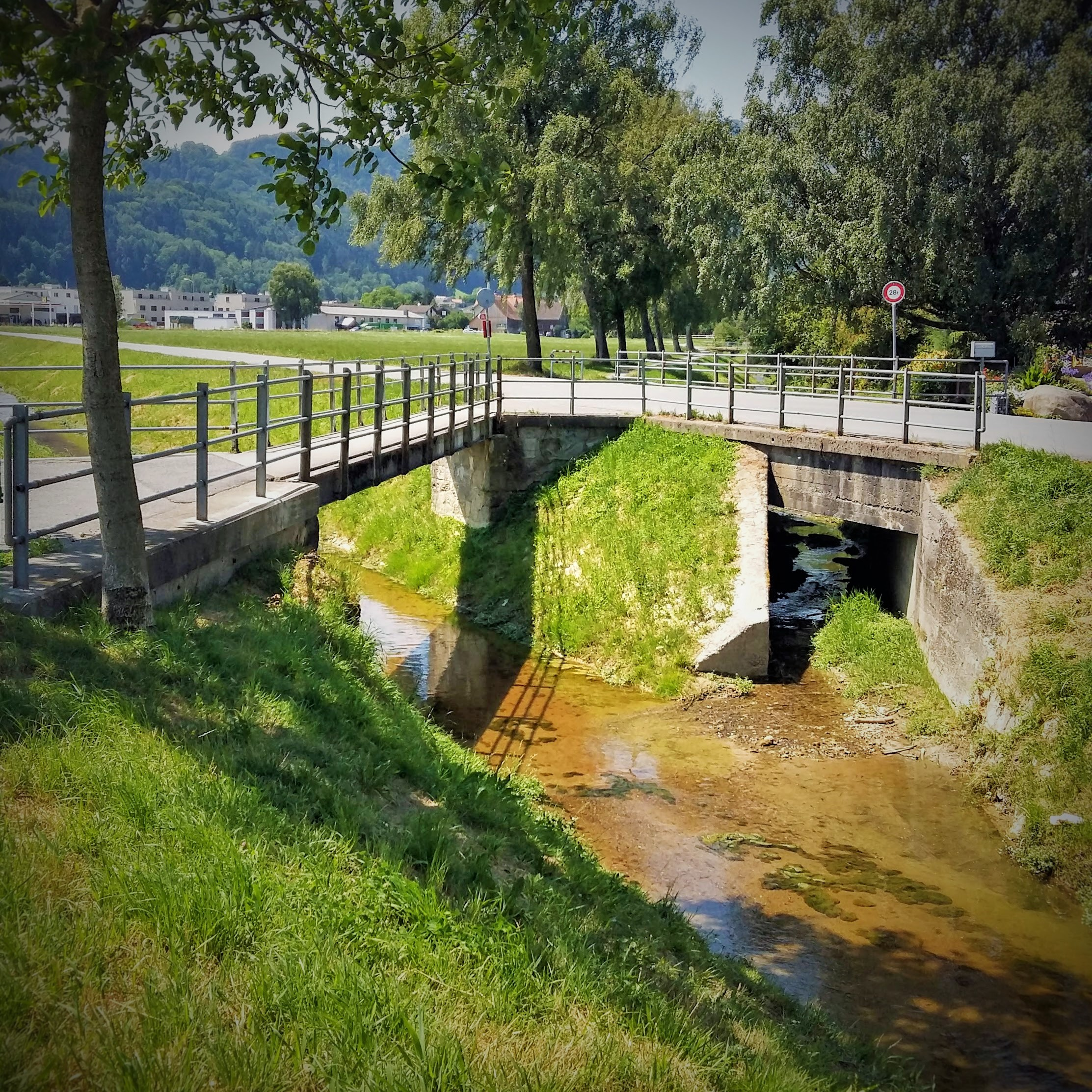 Einmündung des Kübach (von Oben) in den Littenbach (Flussrichtung von Links nach Rechts)